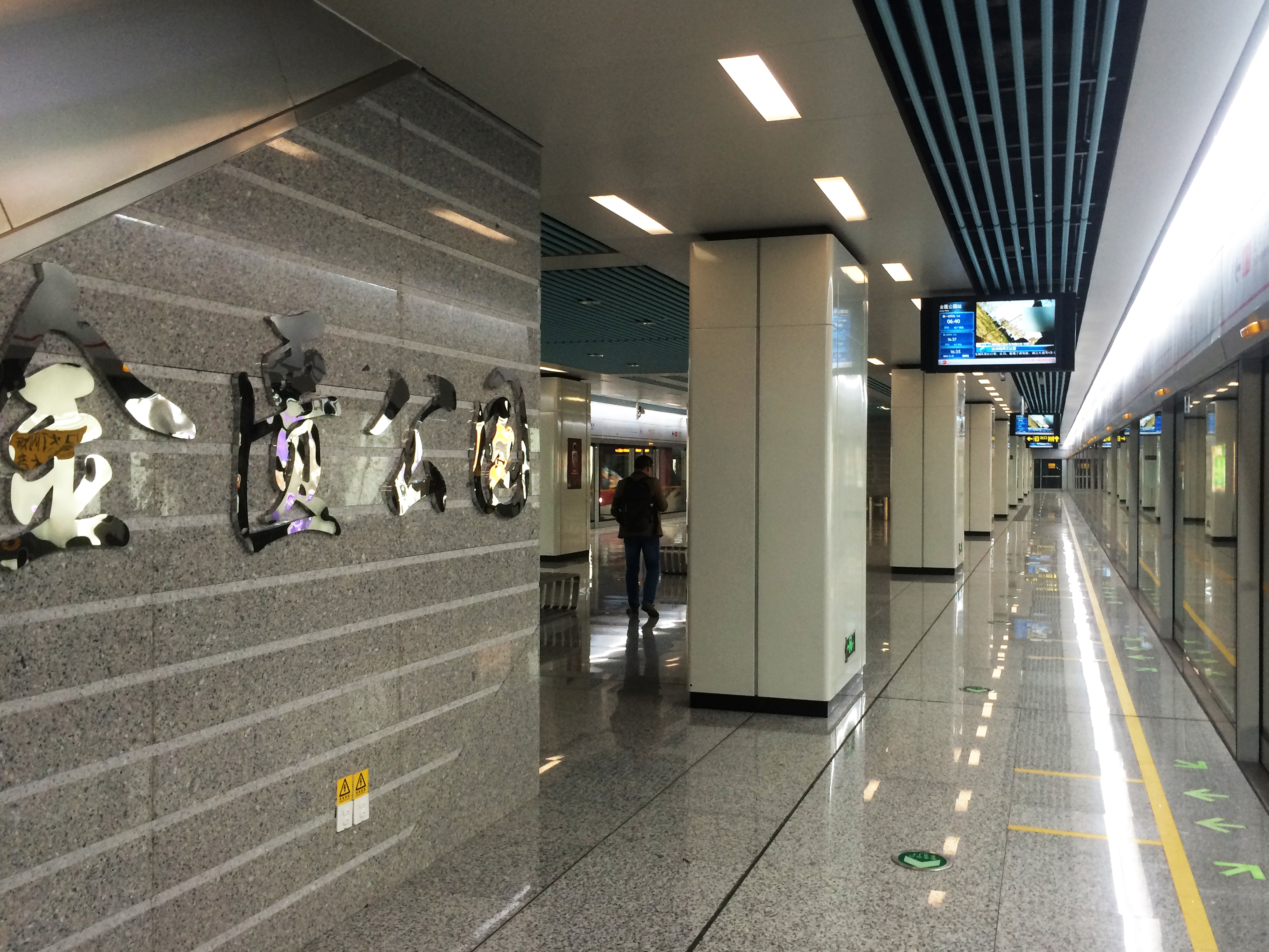 無錫地鐵1號線金匱公園站月臺